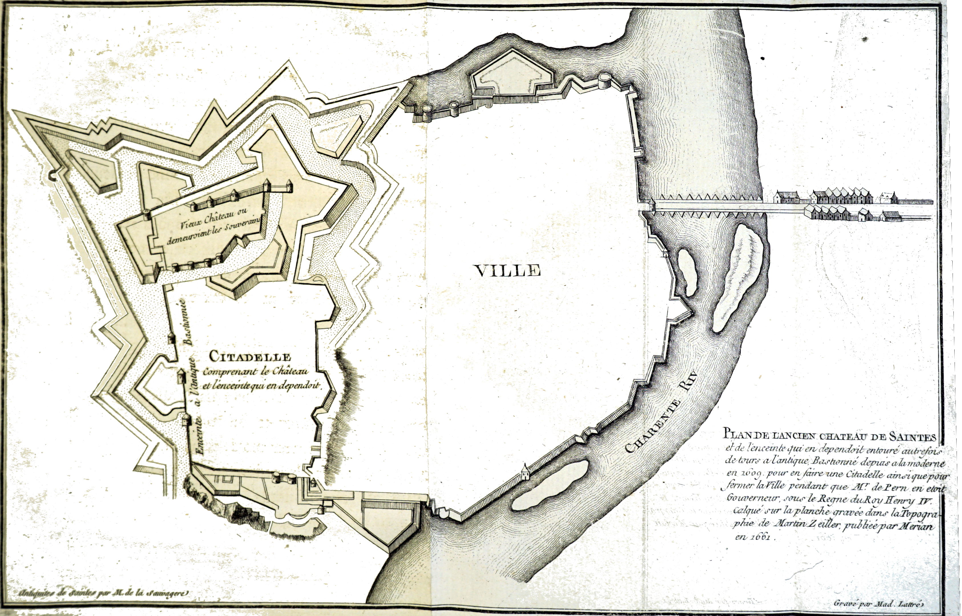 dessin extrait du livre.